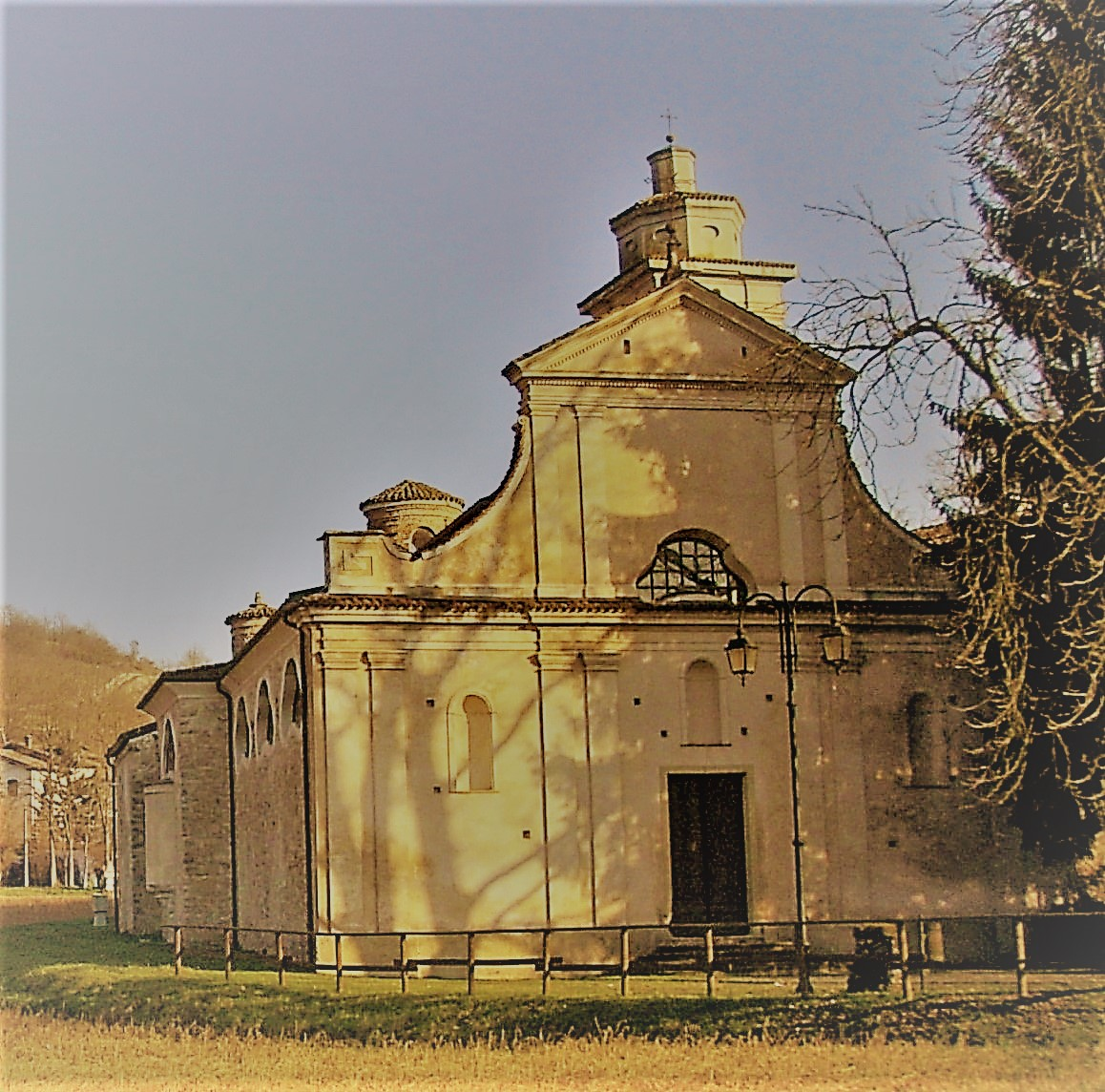 Veduta attuale